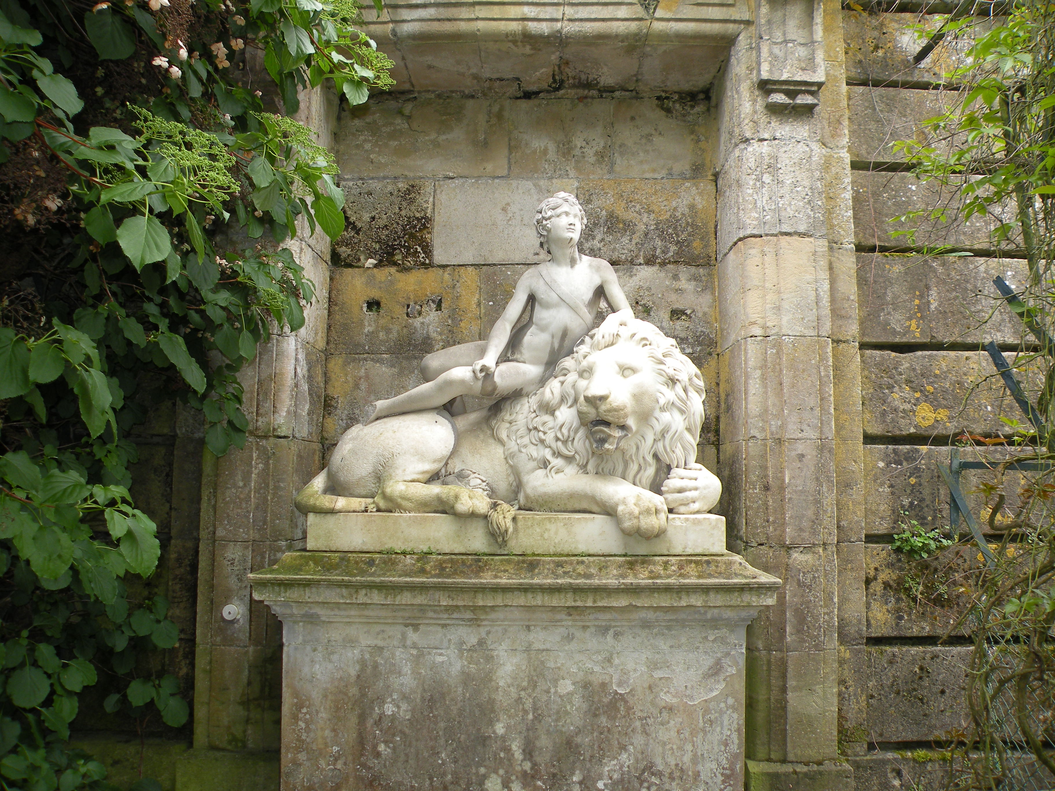 statue de marbre de 1824 de Pierre nicolas Tiolier (1784-1853) exposé au chateau de compiègne